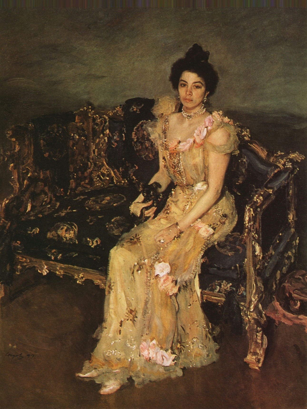 Софья Михайловна Боткина, жена купца и коллекционера Петра Дмитриевича Боткина